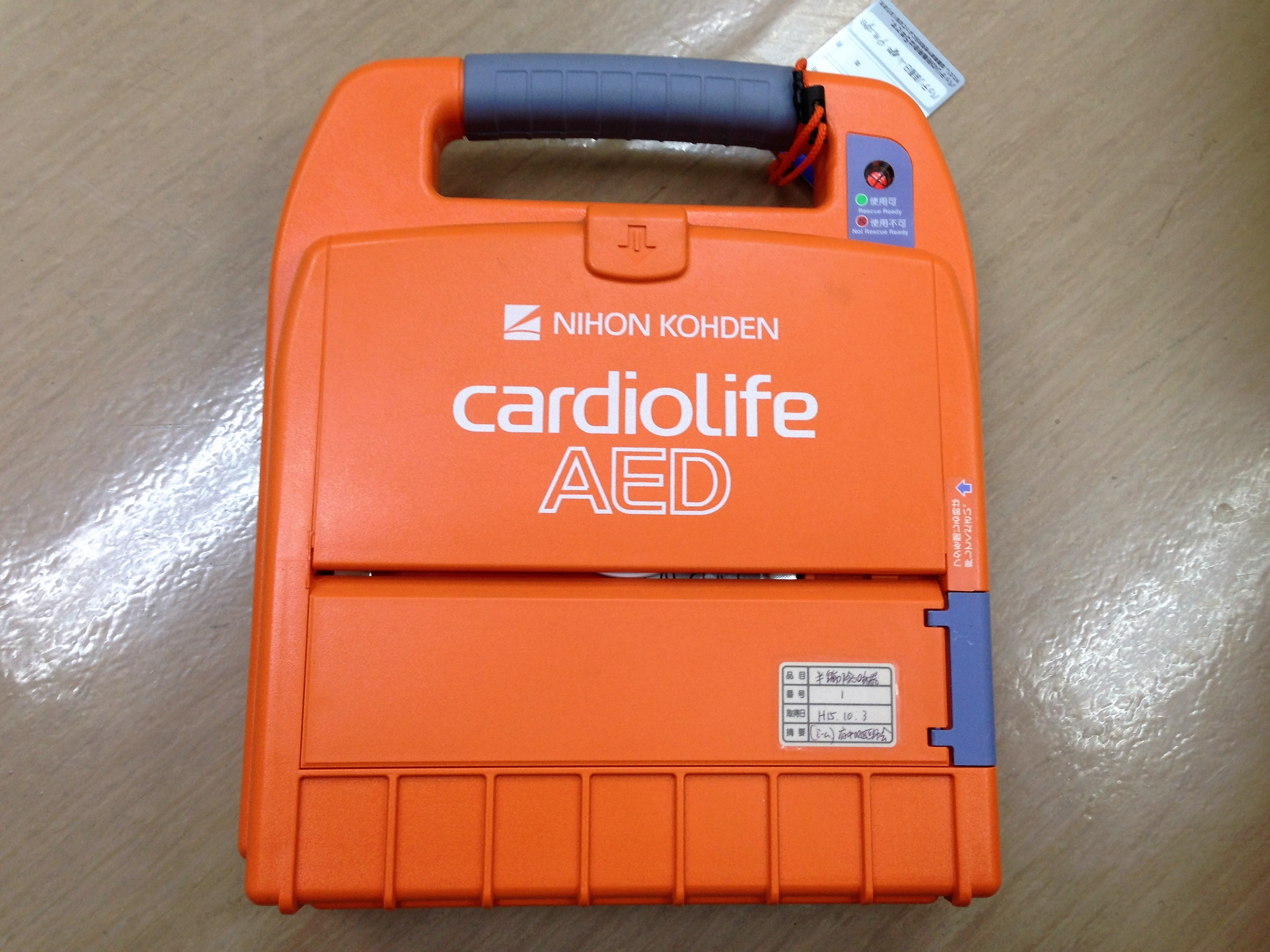 日本光電製AED（外観）